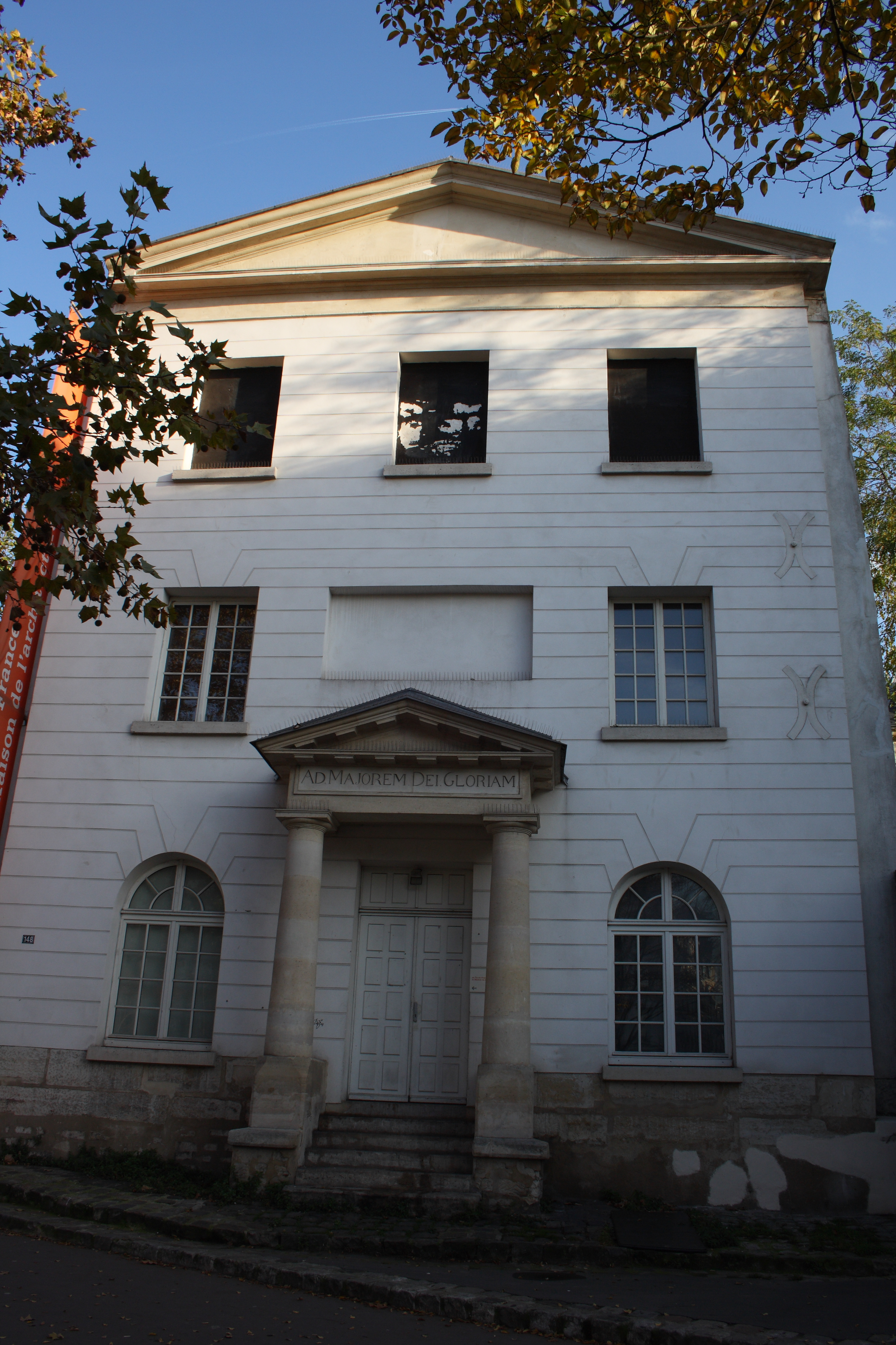 Ehemaliges Rekollektenkloster Couvent des Récollets im 10. Arrondissement von Paris